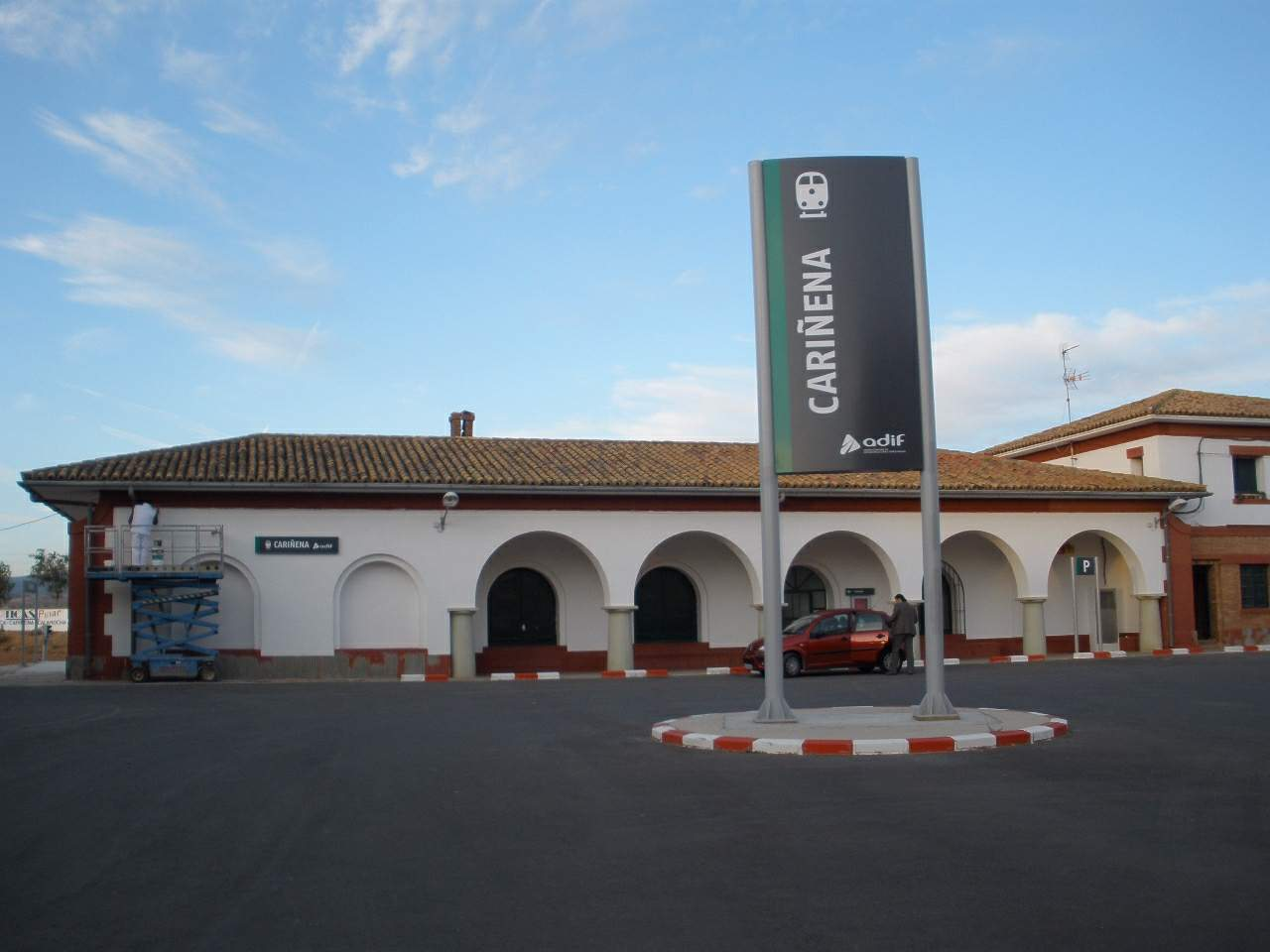 Estación de tren de Cariñena (Zaragoza)